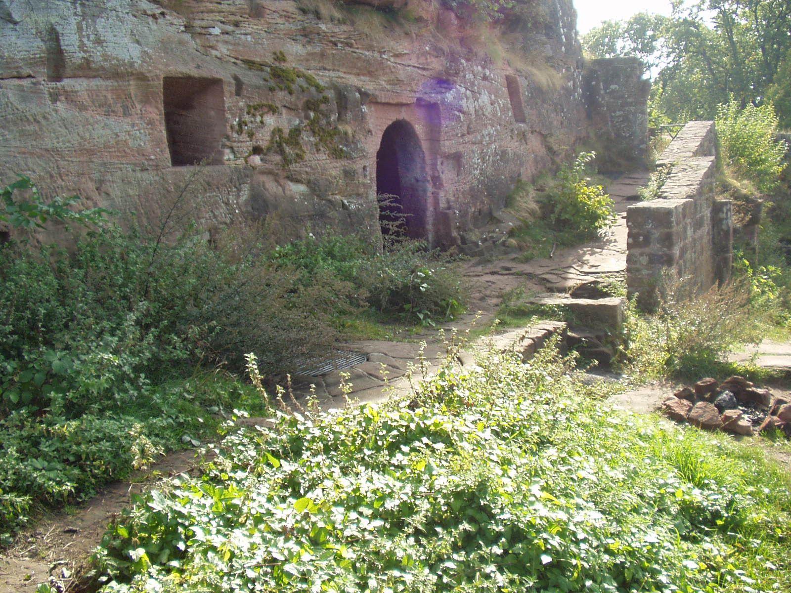 Eingang zur großen Felsenkammer in der Wegelnburg